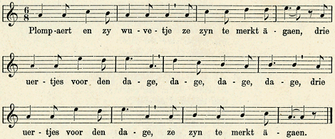 Muzieknotatie van het volksliedje 'Plompaard en zijn wijfje'. In: Florimond van Duyse, "Het oude Nederlandsche lied" (deel 2, 1905). Blz. 1203 (liednummer 330). Oudste vindplaats: ca. 1604.